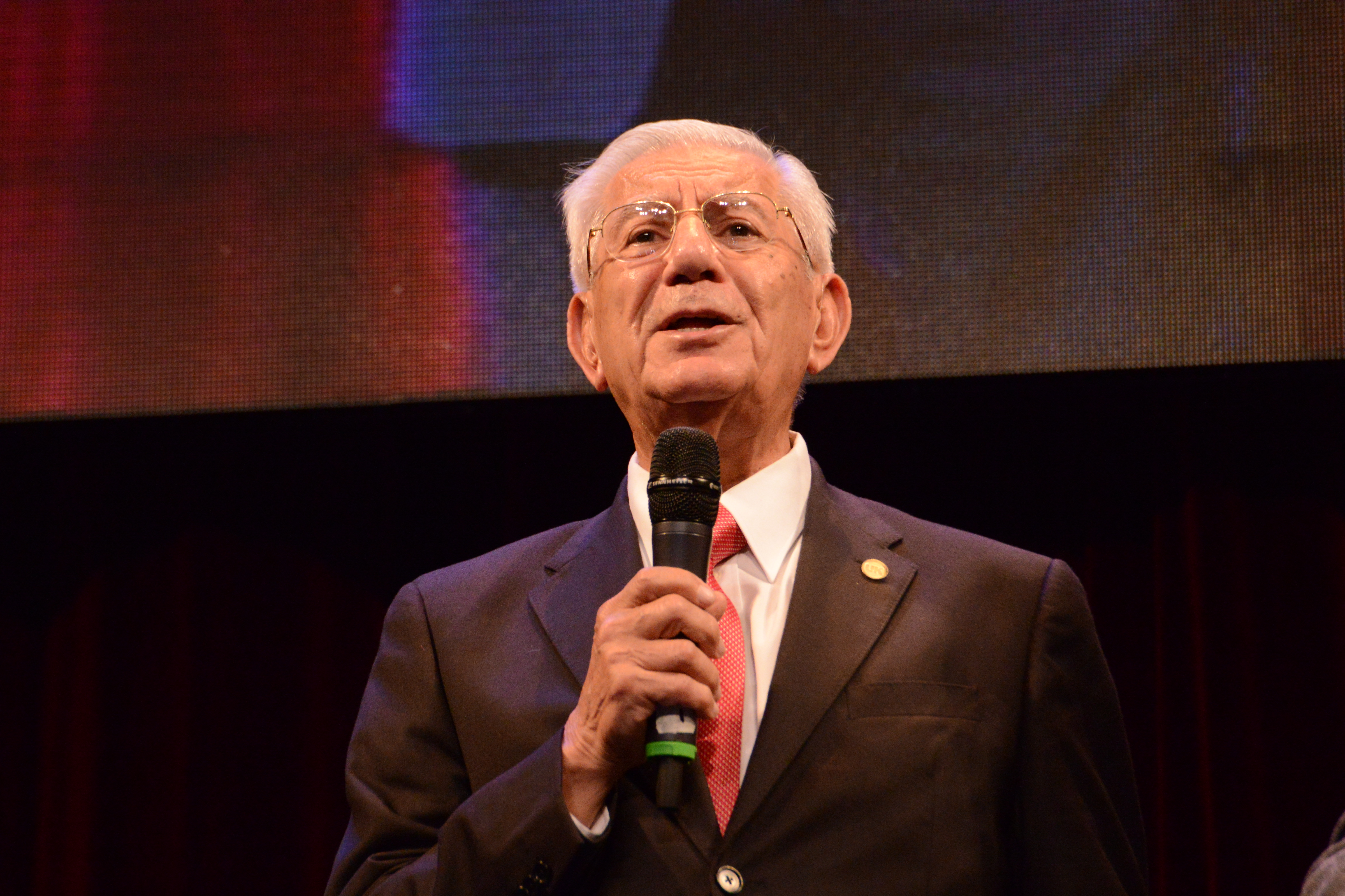 El Dr. Pedro R. David en la Gala de 50 años de la Universidad Kennedy.